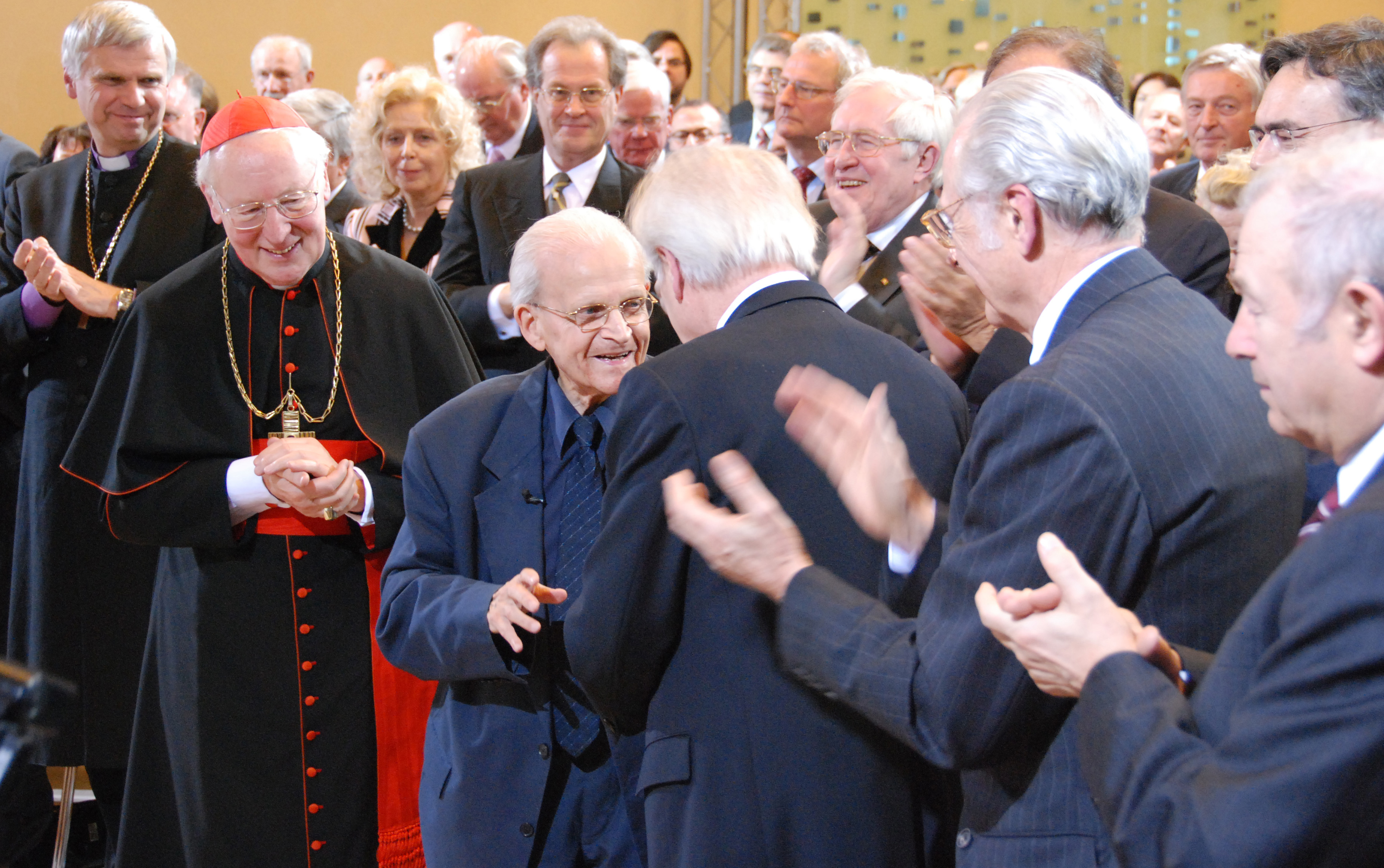 Biser im Kreis seiner Gratulanten